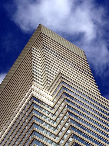 Bloomberg Tower, NY